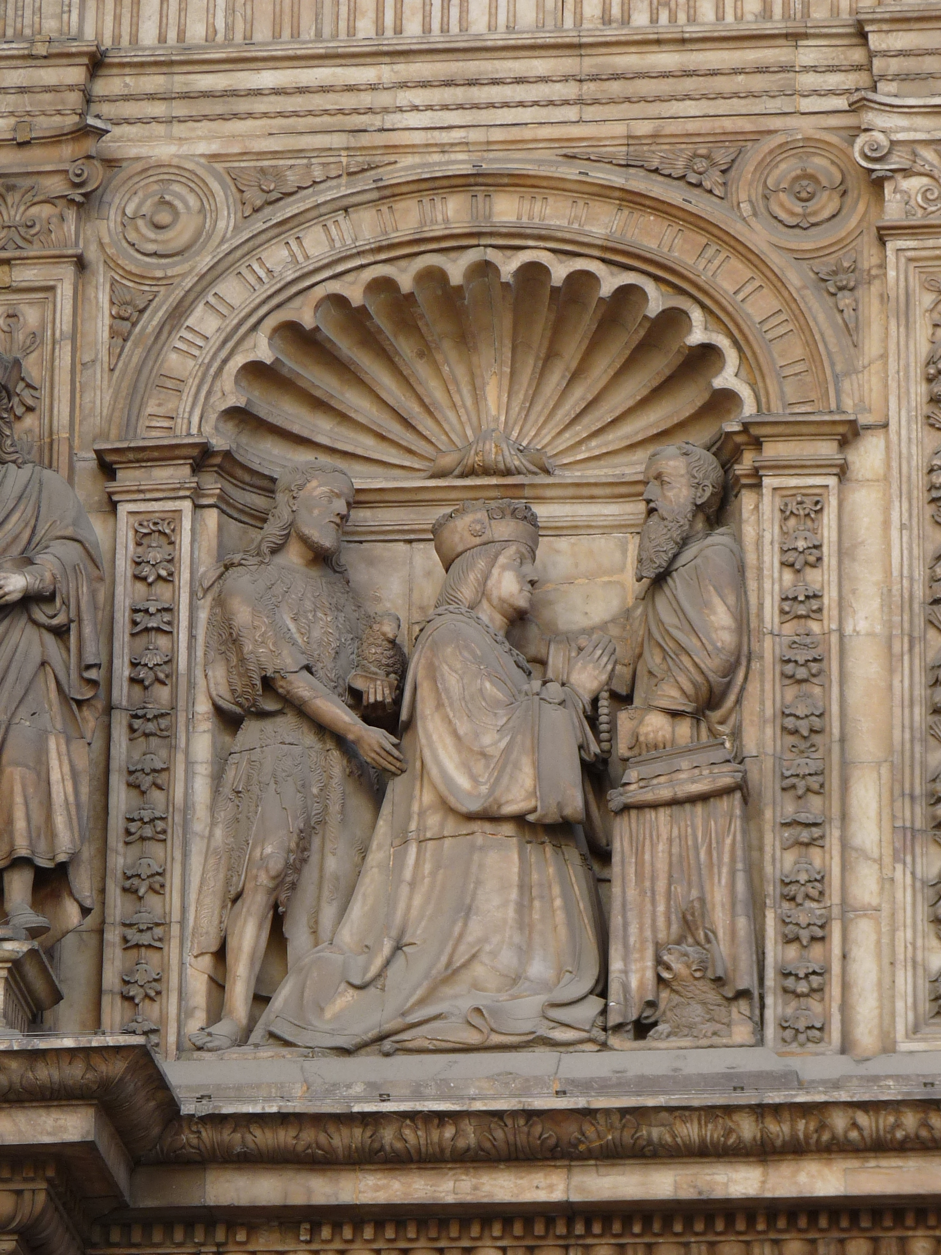 Zaragoza - Iglesia basílica de Santa Engracia - Portada - Fernando el Católico orante